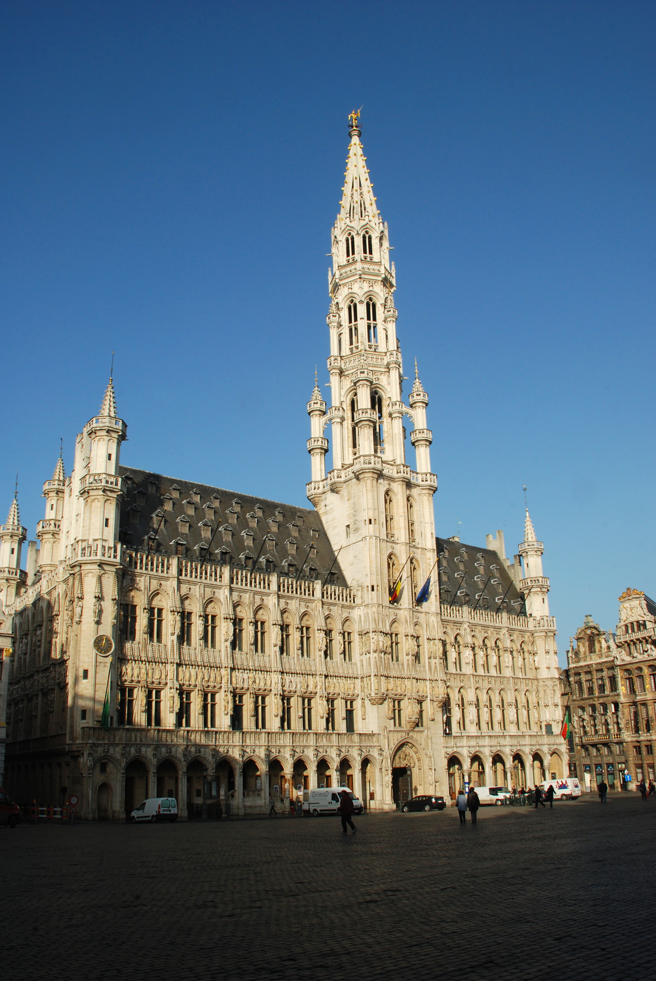 Belgique - Bruxelles - Hôtel de ville de Bruxelles